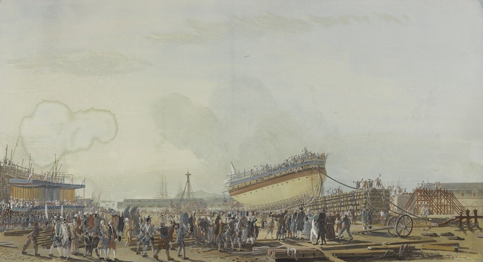 Gouache réalisée en 1777 lors des festivités données en l'honneur du comte de Provence. Lancement du vaisseau le Caton. Offert par l'artiste au comte de Provence, janv. 1778 ; saisie révolutionnaire ; envoyé au Museum central des arts ; envoi du Louvre ; entré à Versailles, 22 août 1879. Dimensions : 53 x 60 cm ; montage dessin : 62 x 87 x 0,8 cm. Matière et technique : Gouache sur papier.